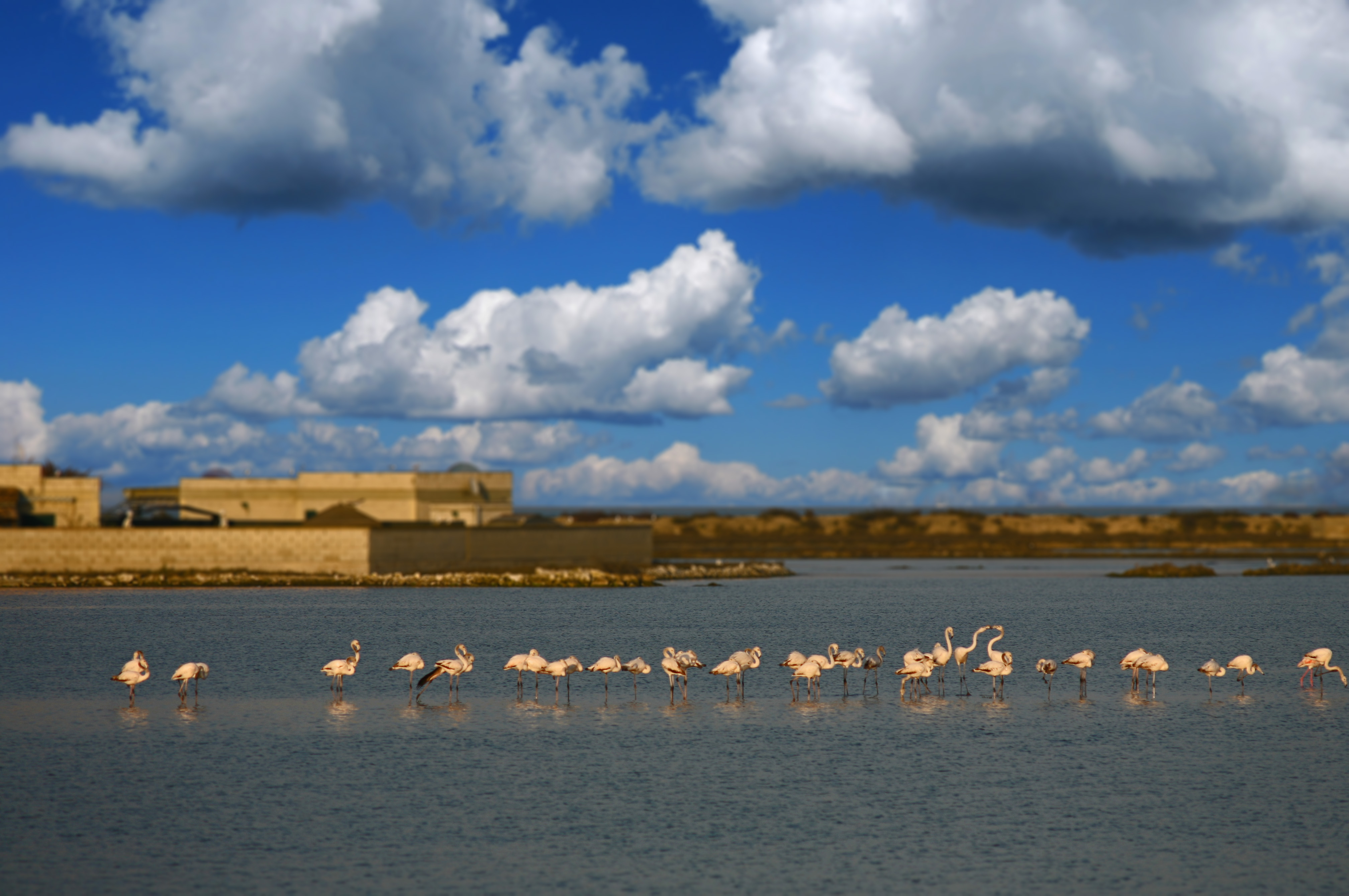 Lago Salso This is a photo of a monument which is part of cultural heritage of Italy. The authorisation for taking photos of this object was provided by the World Wide Fund for Nature Italy.